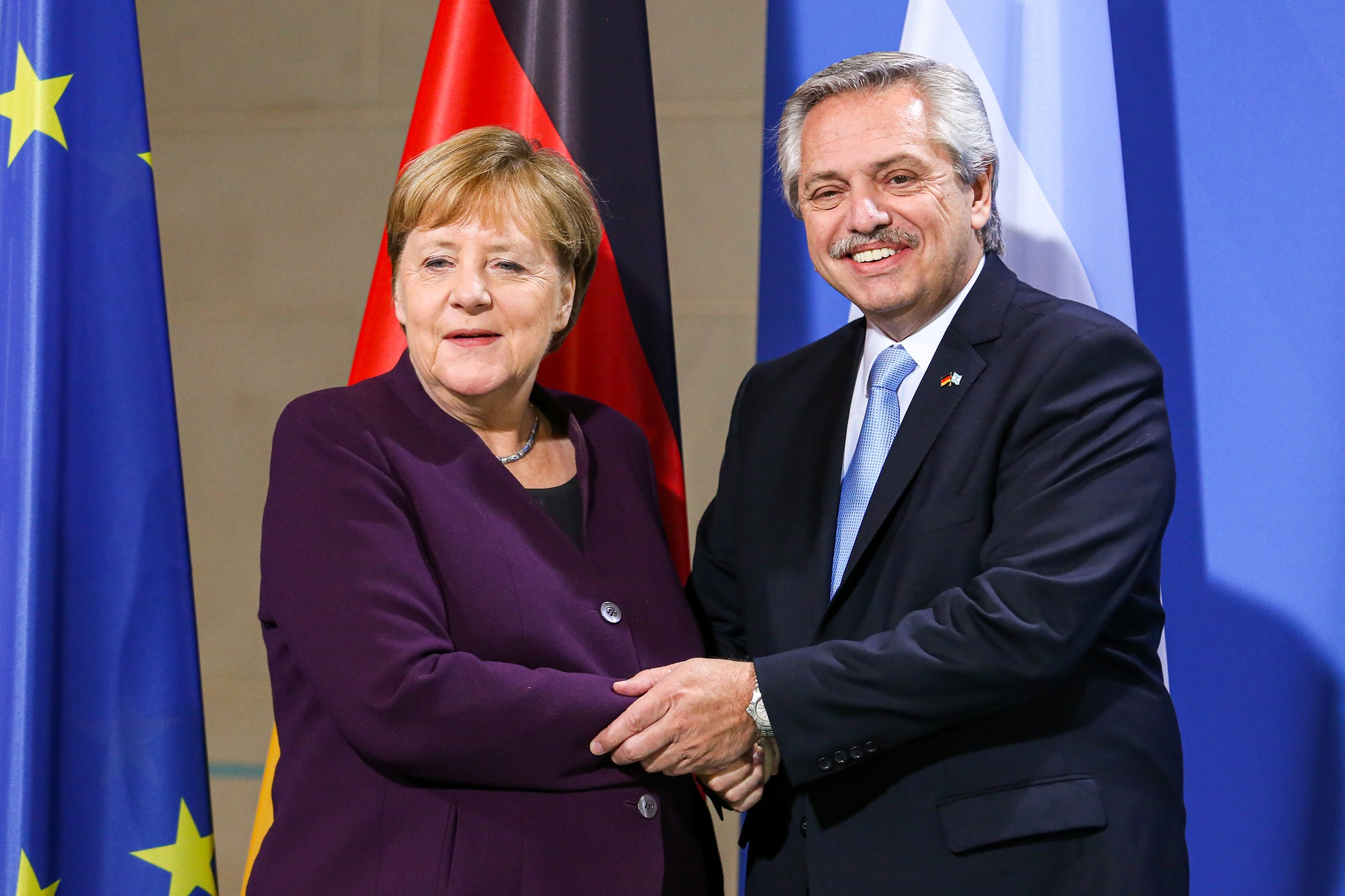 El presidente Alberto Fernández y la canciller alemana, Angela Merkel, brindaron una declaración conjunta de prensa previa al encuentro que mantienen esta tarde en Berlín, en la que el mandatario elogió el “modelo alemán” por ser “el motor de la gran unidad en la Unión Europea”.